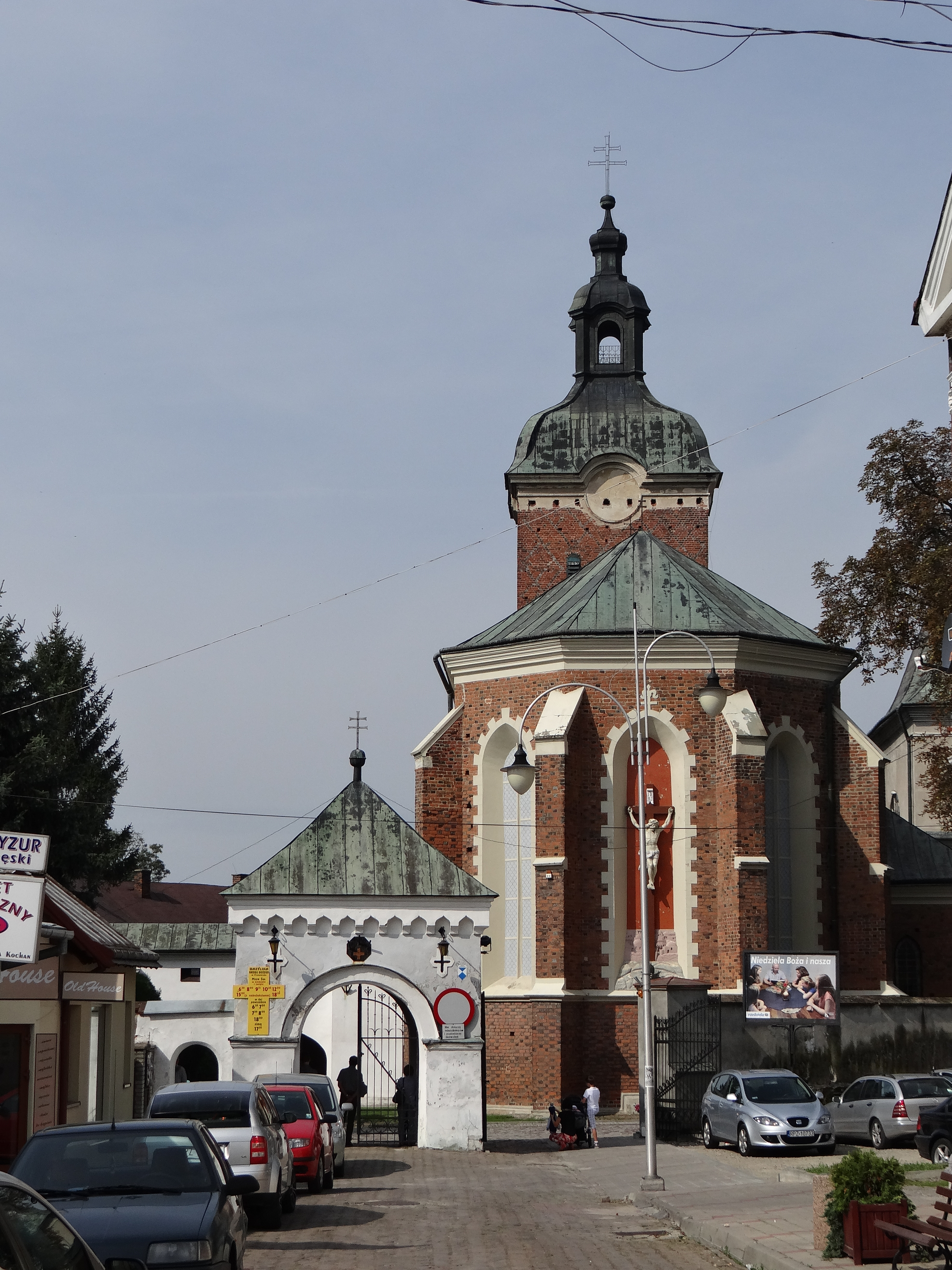 Przeworsk, kościół, ob. par. p.w. Św. Ducha (z kaplicą Grobu Chrystusa), 1430-1473, 1718, 1908